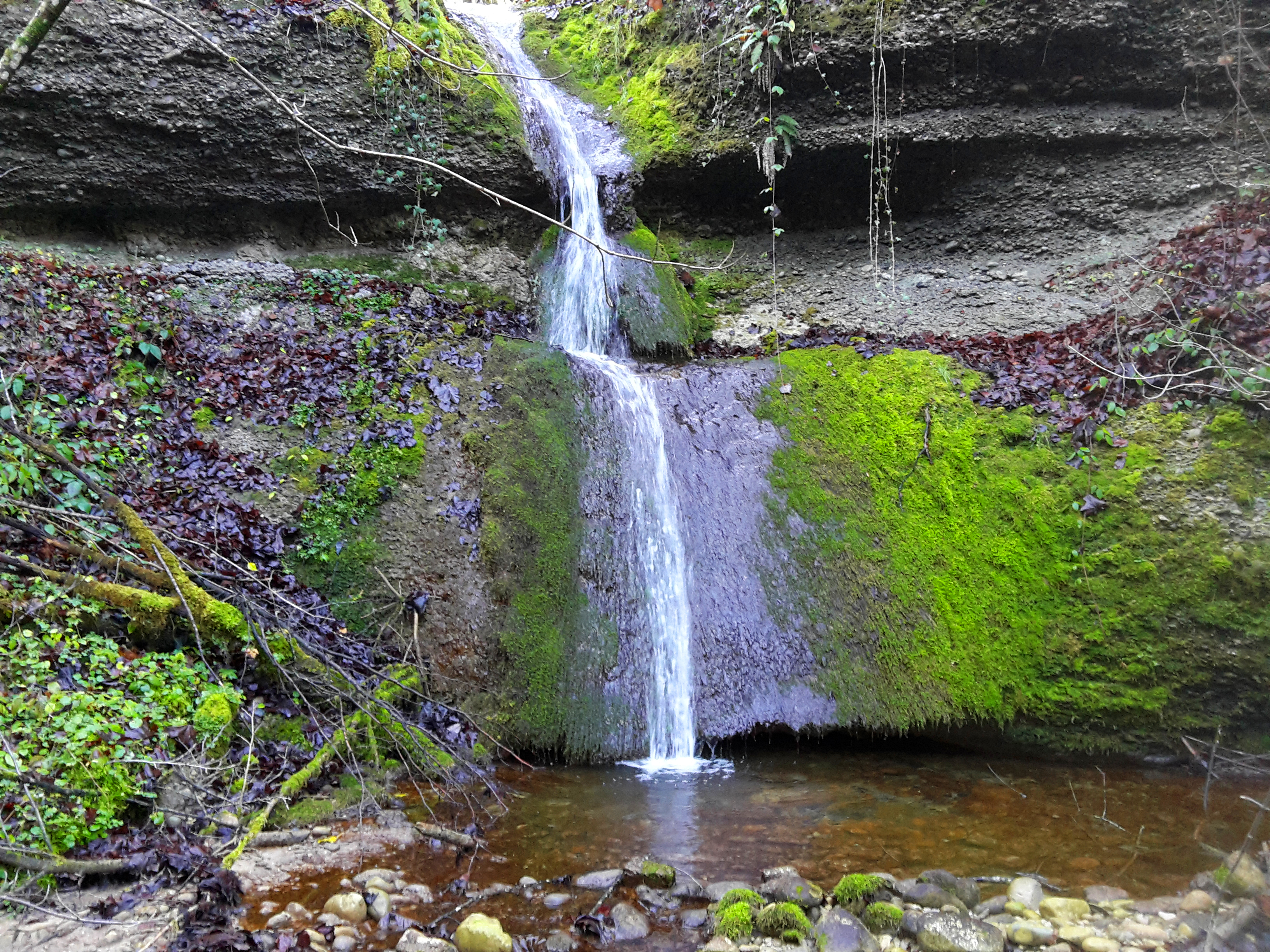 8 Meter hoher Wasserfall am Neschwilerbach (Schliifibach)